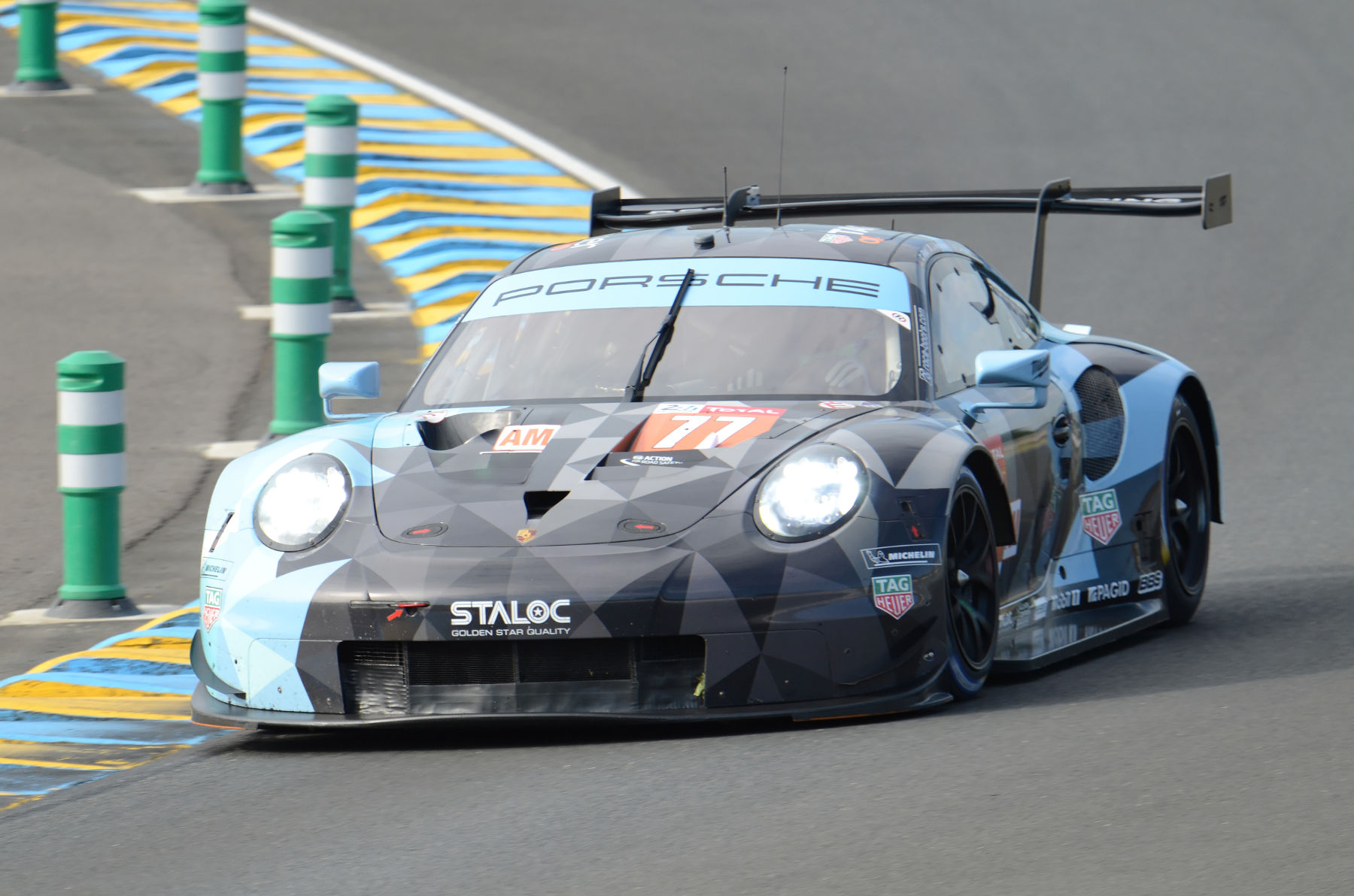 La Porsche 911 RSR n°77 de l'écurie Dempsey Proton Racing pilotée par Matt Campbell, Julien Andlauer et Christian Ried lors de la journée test des 24 Heures du Mans 2018